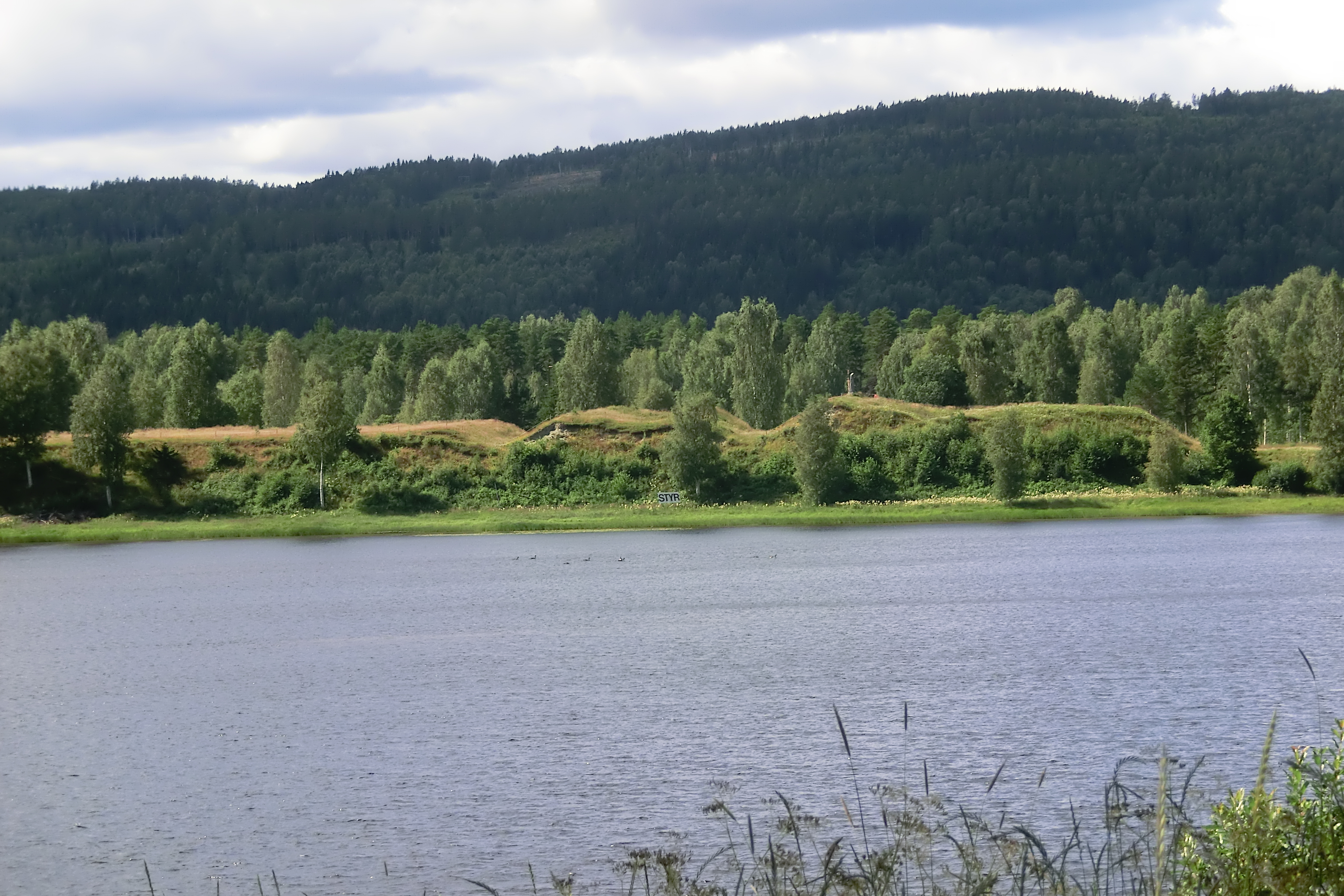 Styresholm